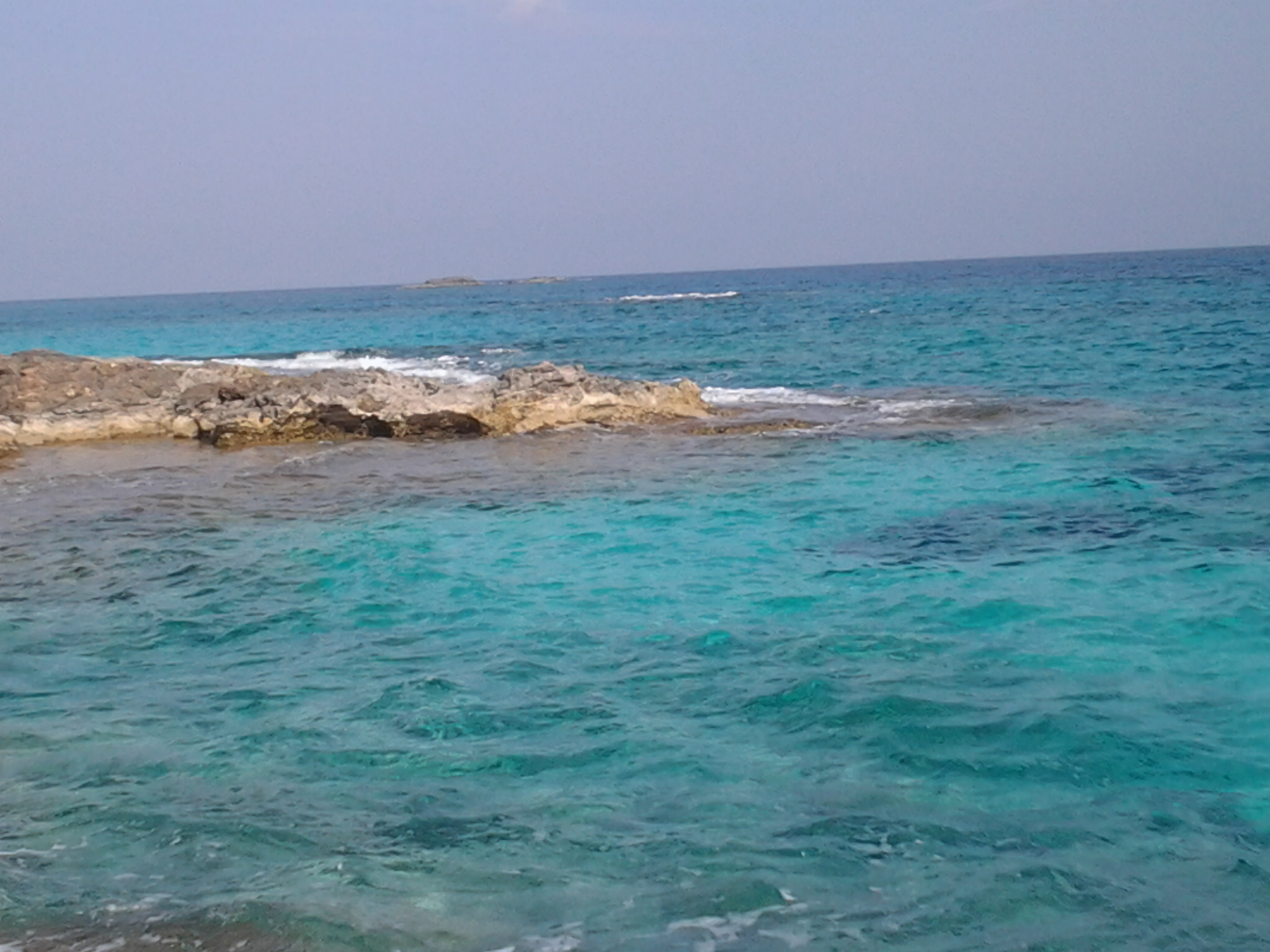 Ras Alhekma.Egypt4